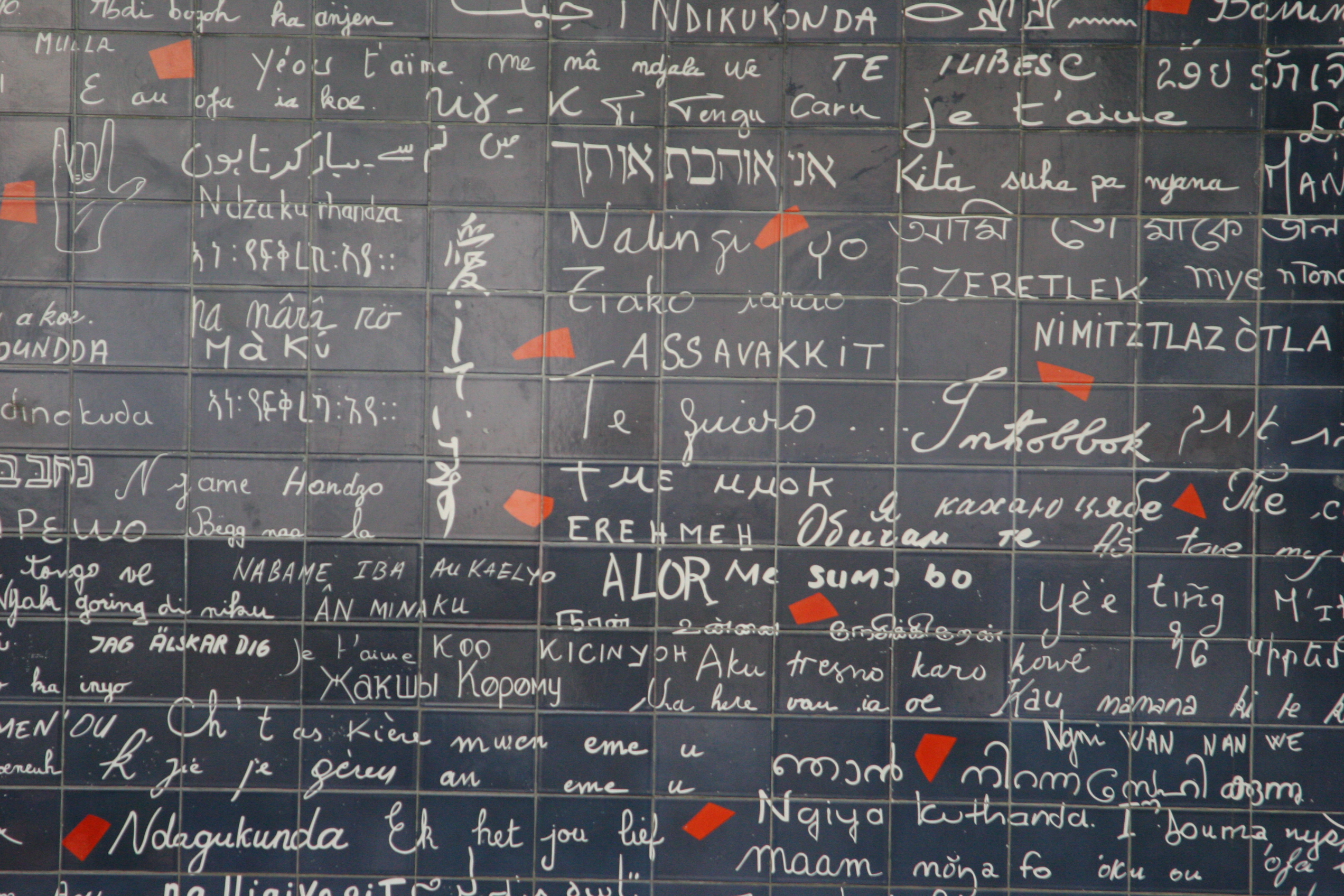 Париж, Франция. Май 2012 Paris, France. May 2012